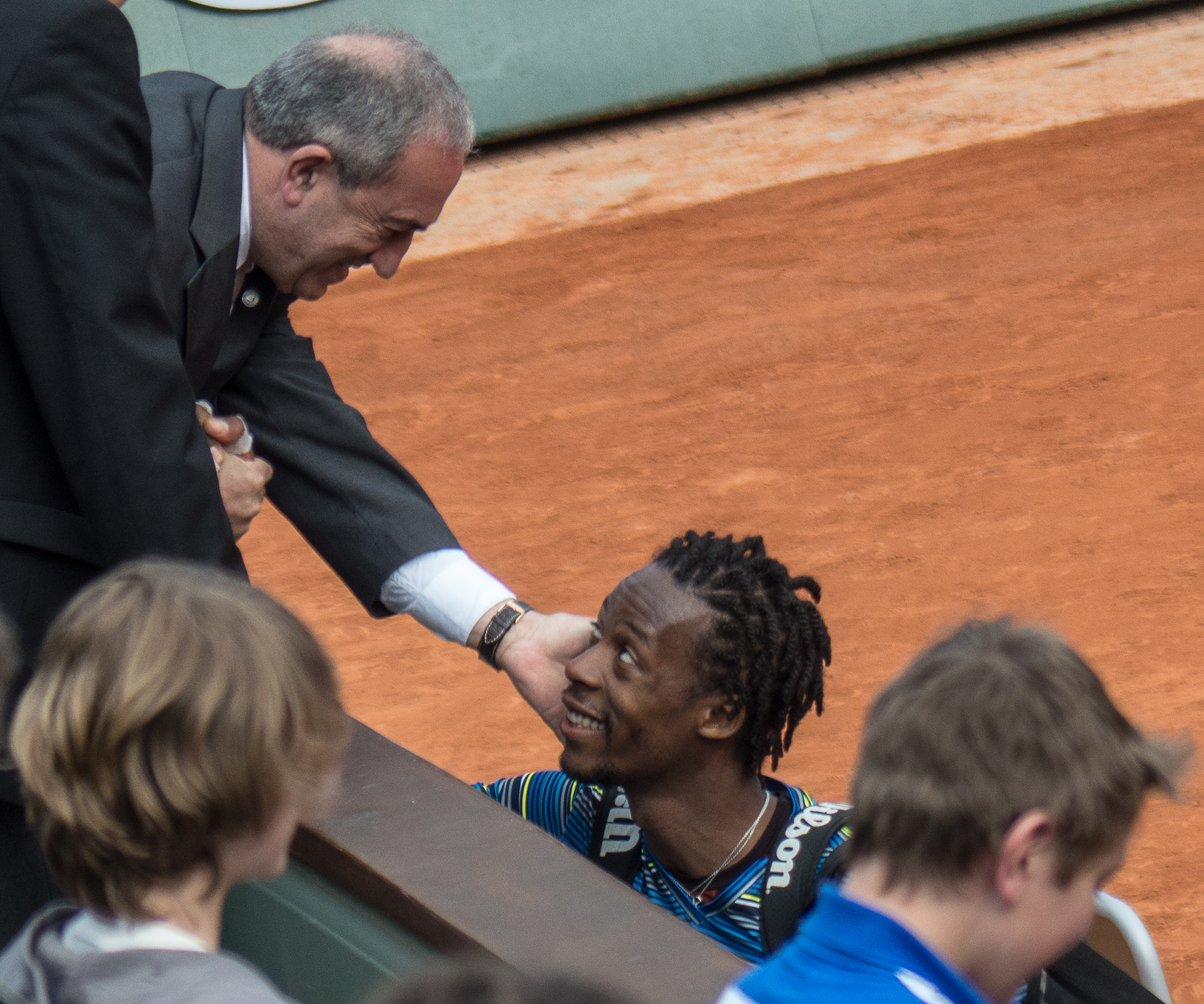 2ème tour Roland-Garros 2013 : Gaël Monfils (FRA) def. Ernests Gulbis (LAT). Jean Gachassin est à gauche.